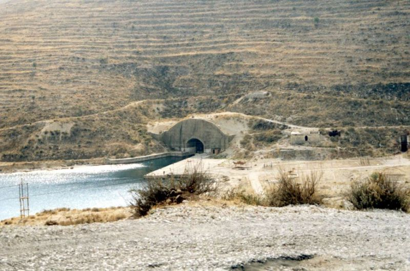 U-Boot-Bunker in Porto Palermo am Ionischen Meer in Südalbanien.